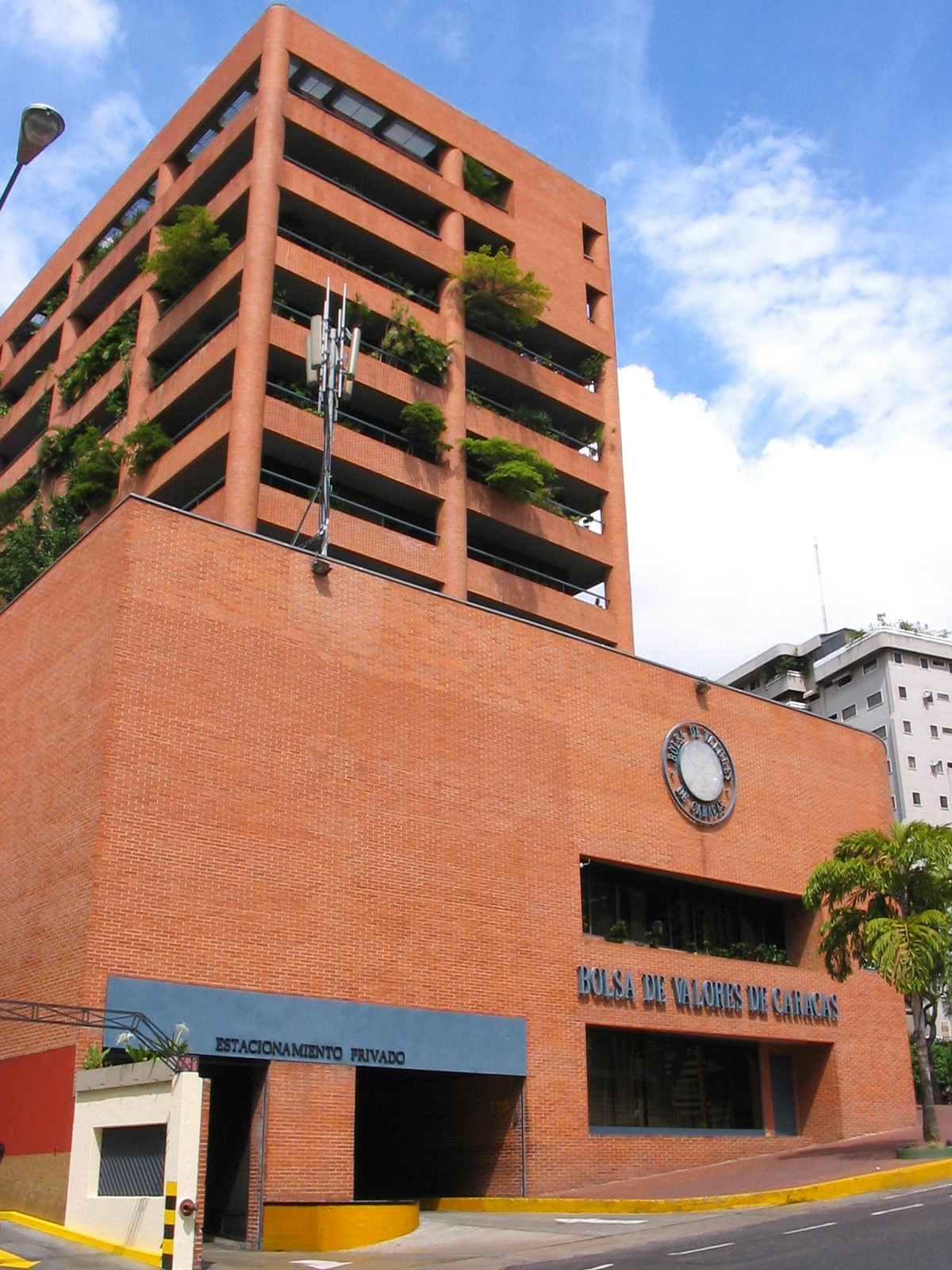 Imagen tomada por Hugo Londoño para la Bolsa de Valores de Caracas.